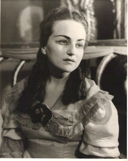 נחמה דוידית בתפקיד טרז היינה בהצגה משפחת היינה